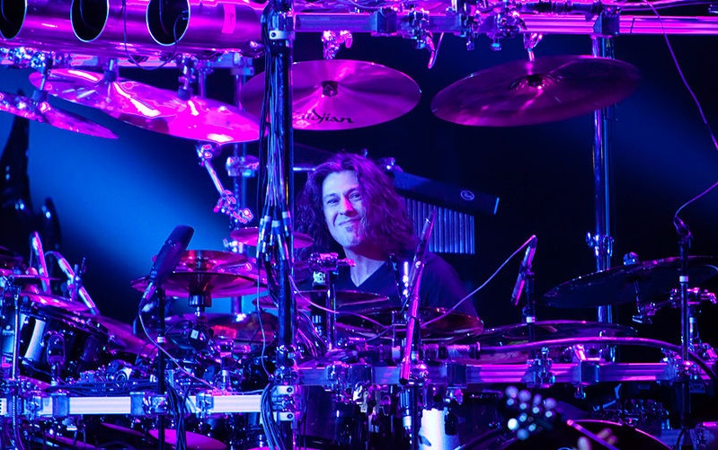 Mike Mangini em concerto com o Dream Theater, 12 Jul 2011, Moscow